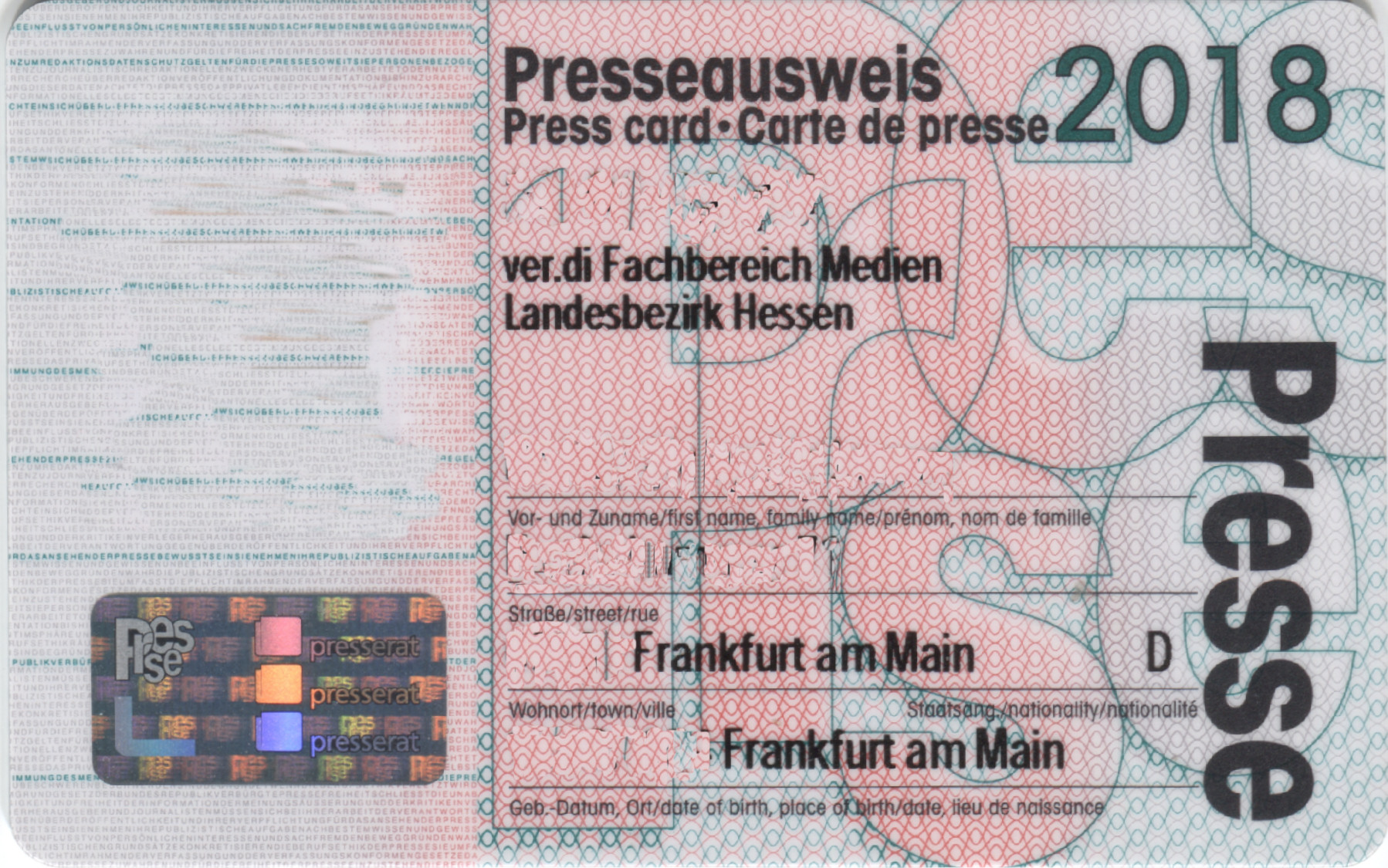 deutscher bundeseinheitlicher Pressseausweis für 2018, ausgegeben von DJV, ver.di/dju, BDZV, VDS, VDZ und freelens